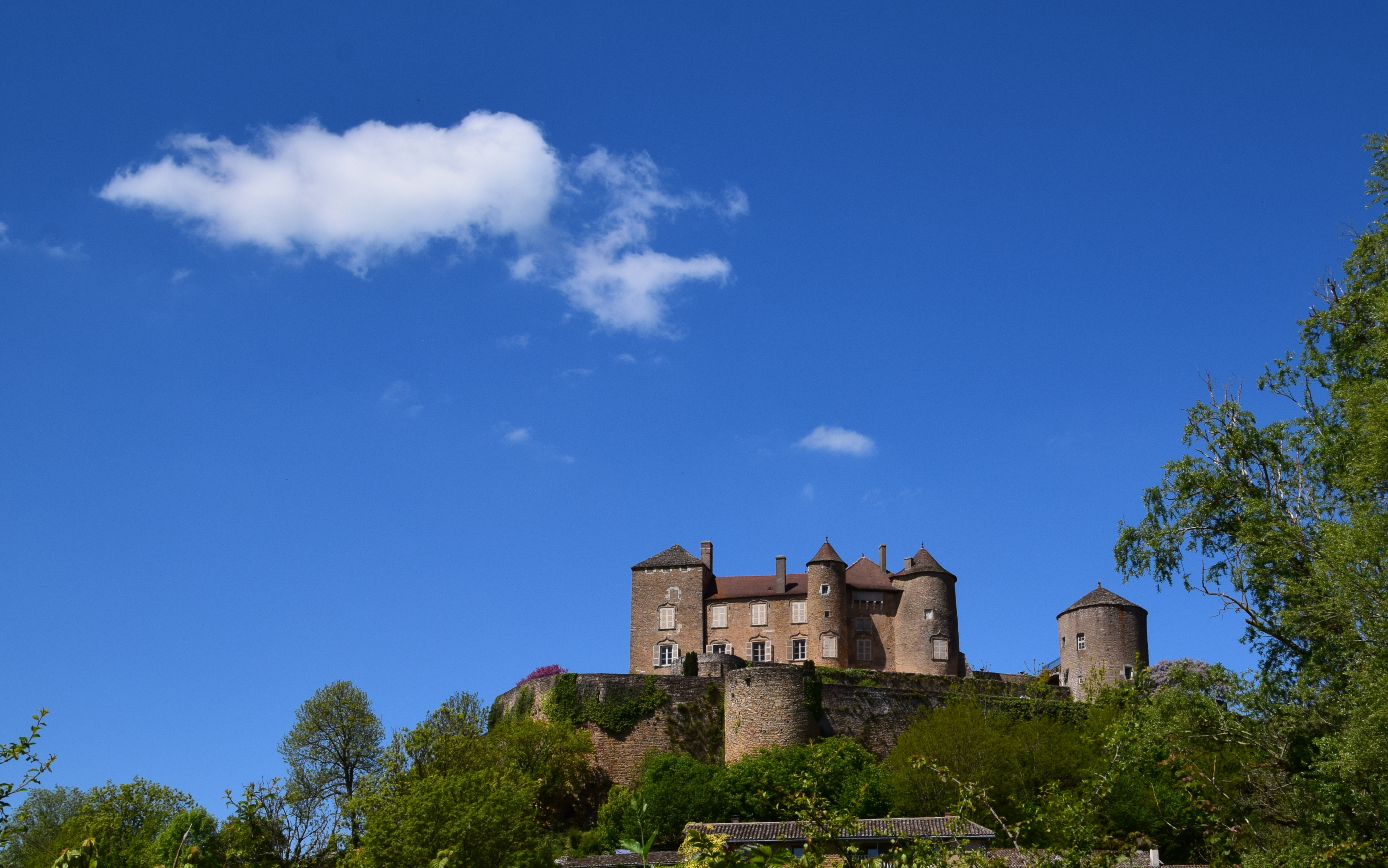 Château de Berzé le Chatel 71